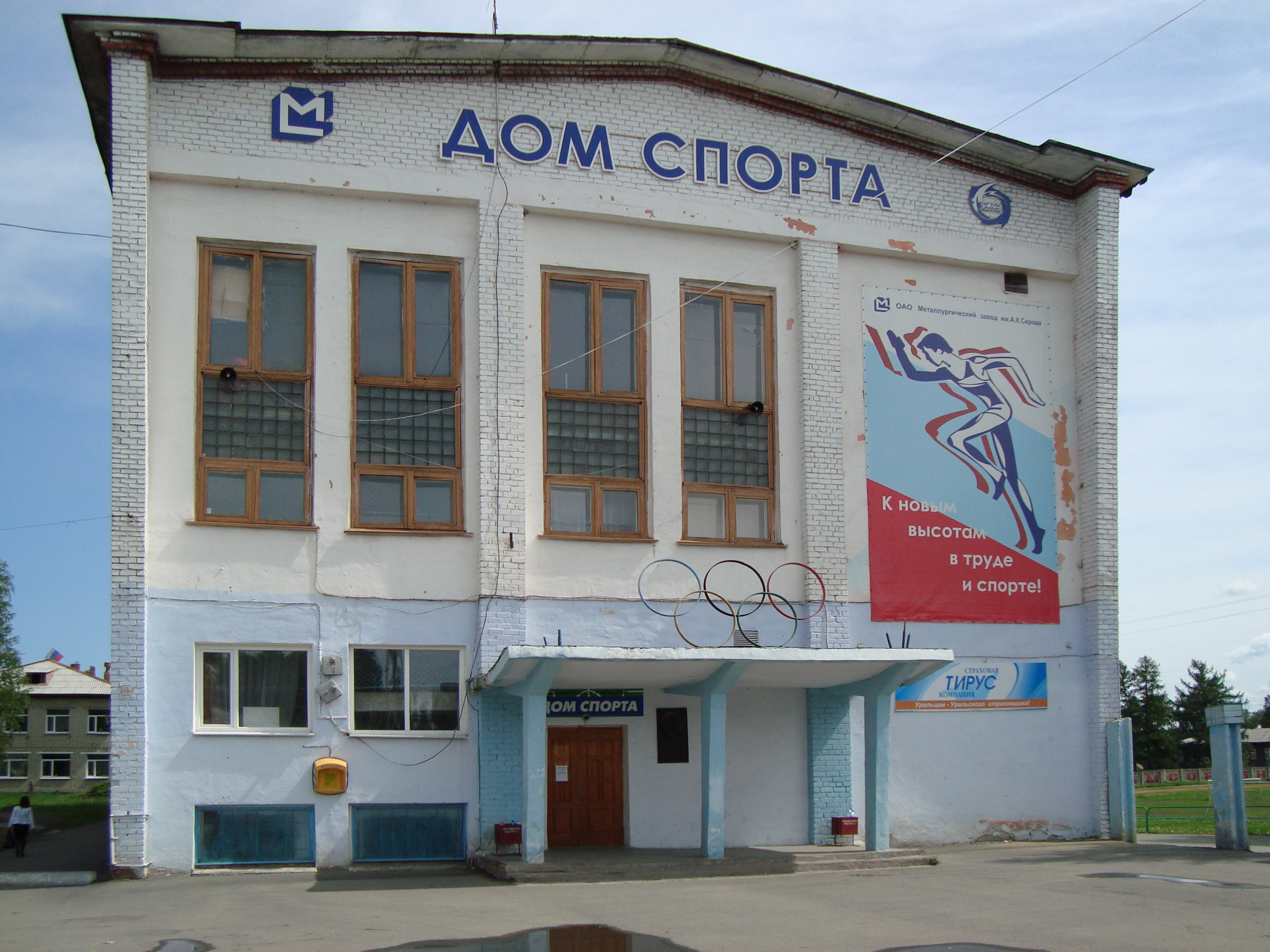 Дом спорта